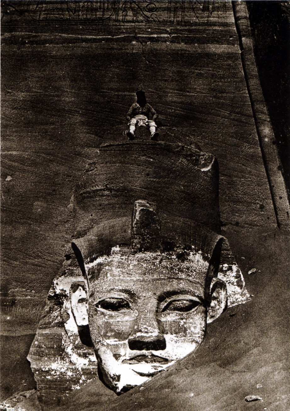 Eine der halb im Sand versunkenen Kolossalstatuen Ramses II. an der Außenwand des Tempels von Abu Simbel. Die Aufnahme stammt vom französischen Fotografen, Schriftsteller und Journalisten Maxime Du Camp, die Gestalt am Kopf der Statue ist Gustave Flaubert